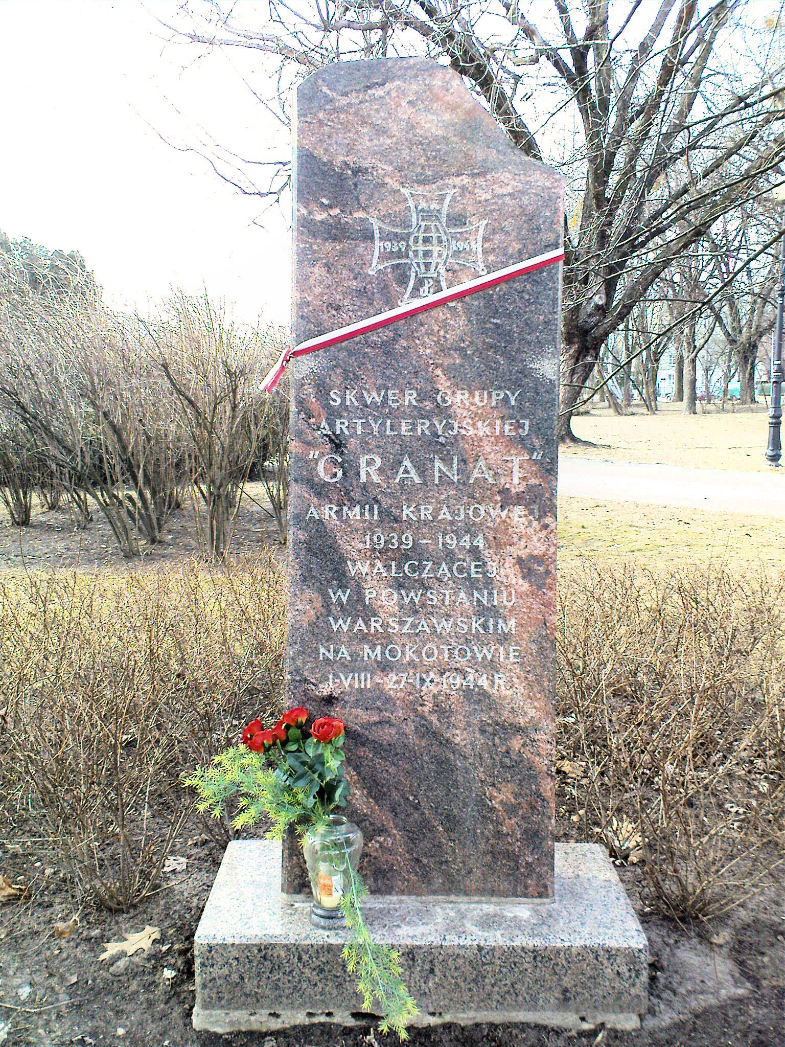 Skwer Grupy AK "Granat" - kamienny obelisk poświęcony pamięci artyleryjskiej Grupy AK "Granat" walczącej na Mokotowie w czasie Powstania Warszawskiego miedzy 1 sierpnia a 27 września 1944 r.